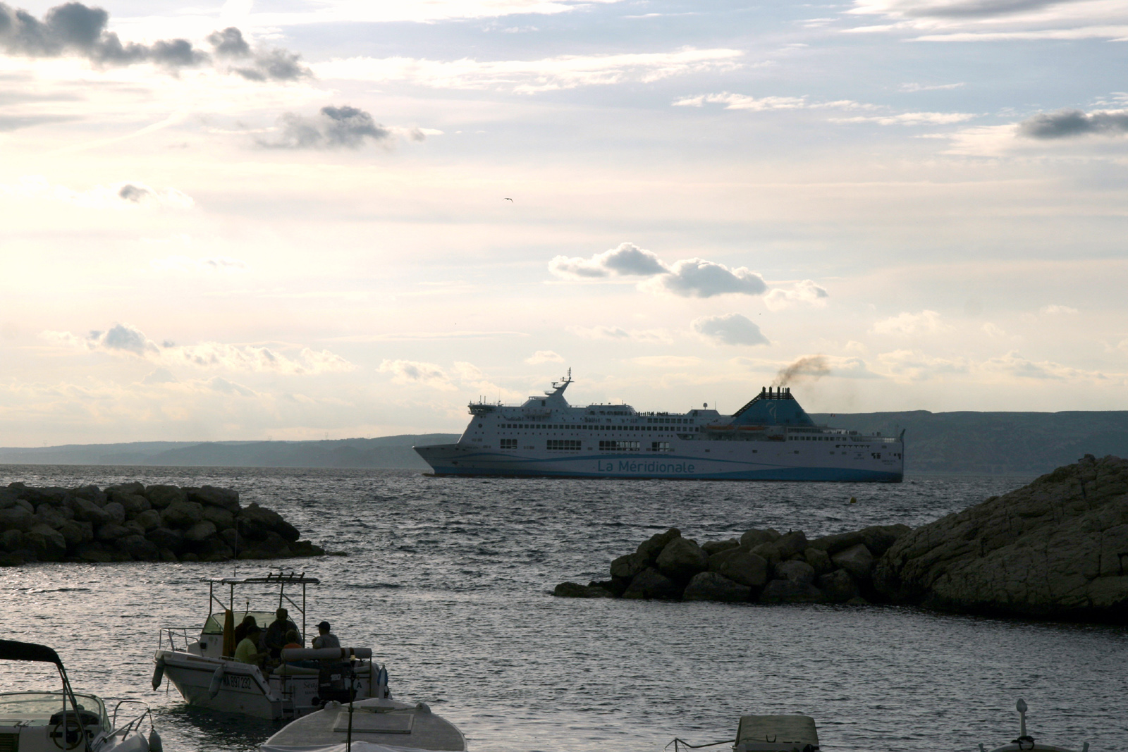 Le Girolata sortant du port de Marseille